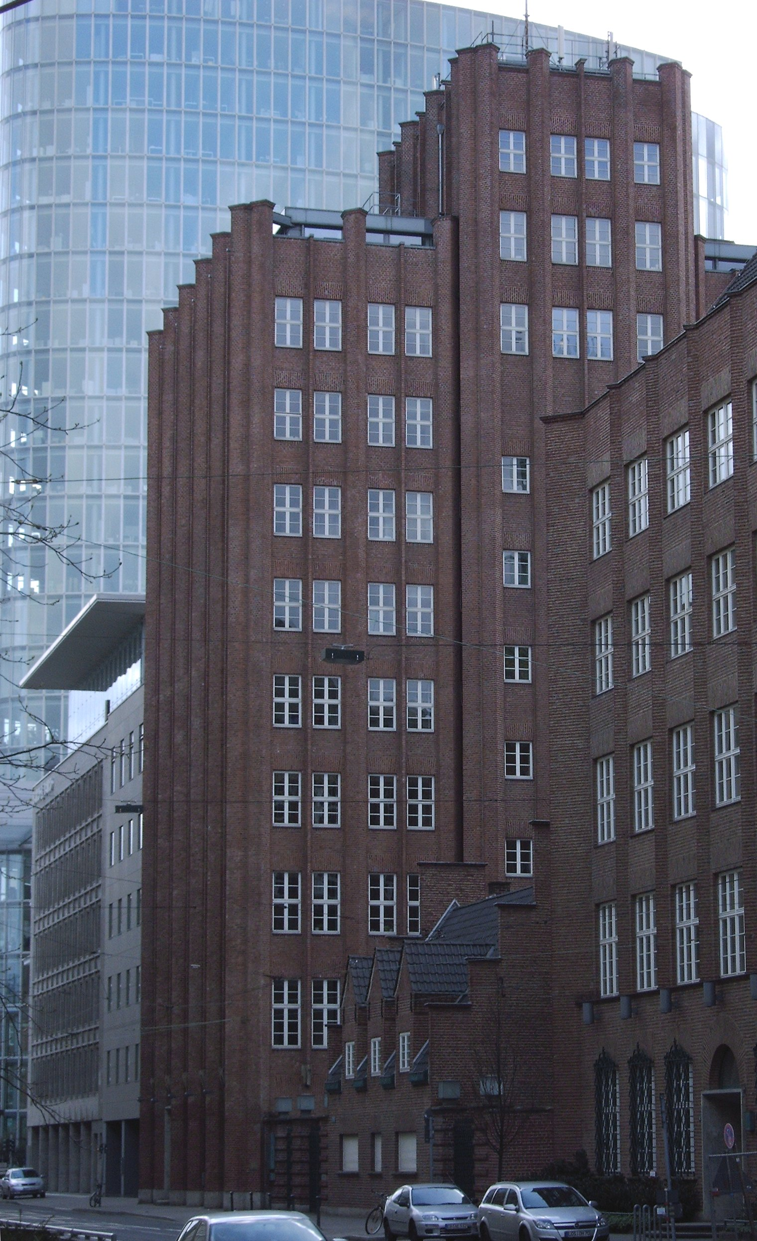 Stummhaus, Breite Straße 67-69, Düsseldorf-Stadtmitte (Architekt: Paul Bonatz)